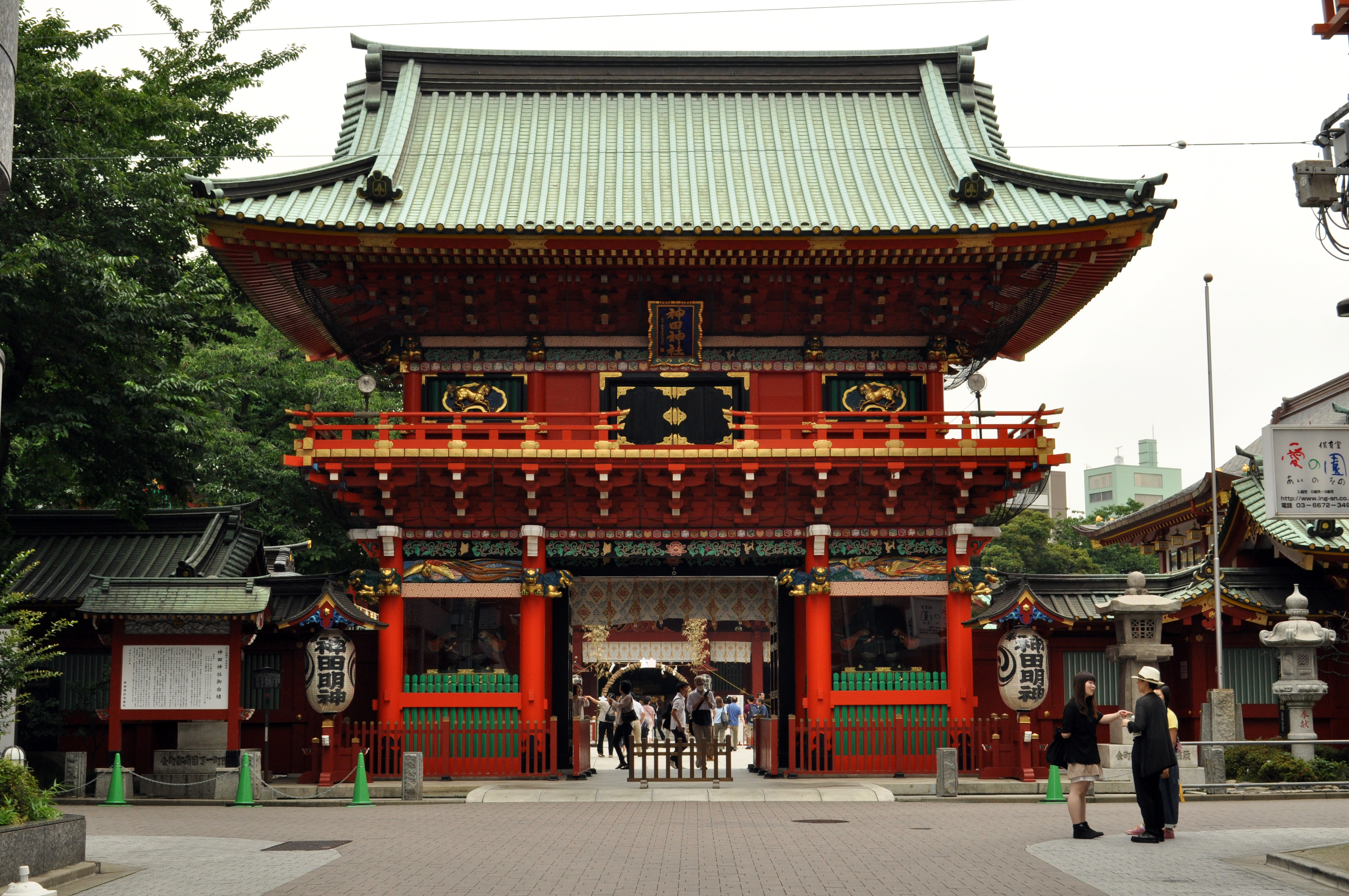 神田明神の隨神門